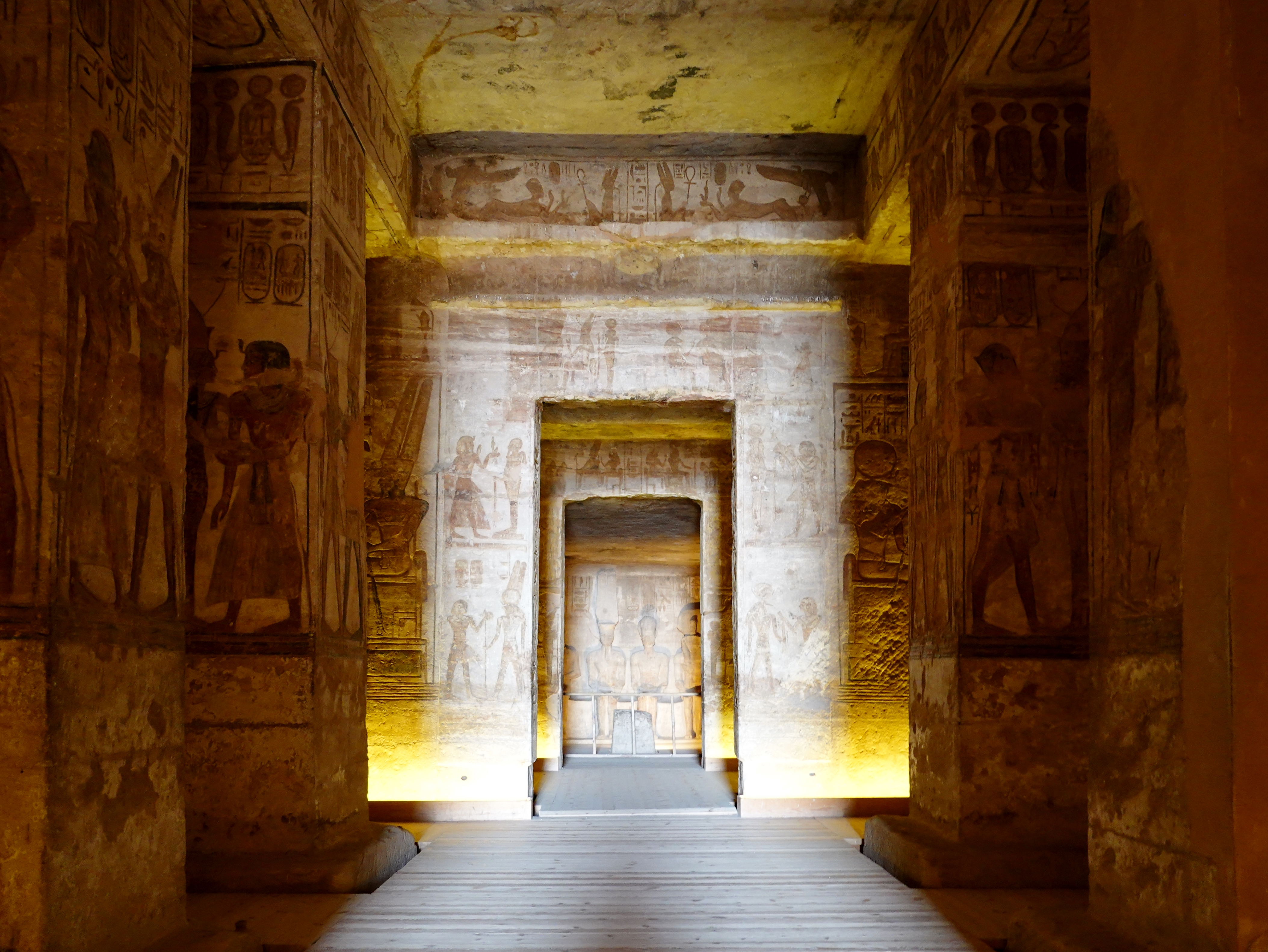 Blick nach Westen zum Allerheiligsten aus der kleinen Pfeilerhalle im großen Tempel von Abu Simbel, Ägypten